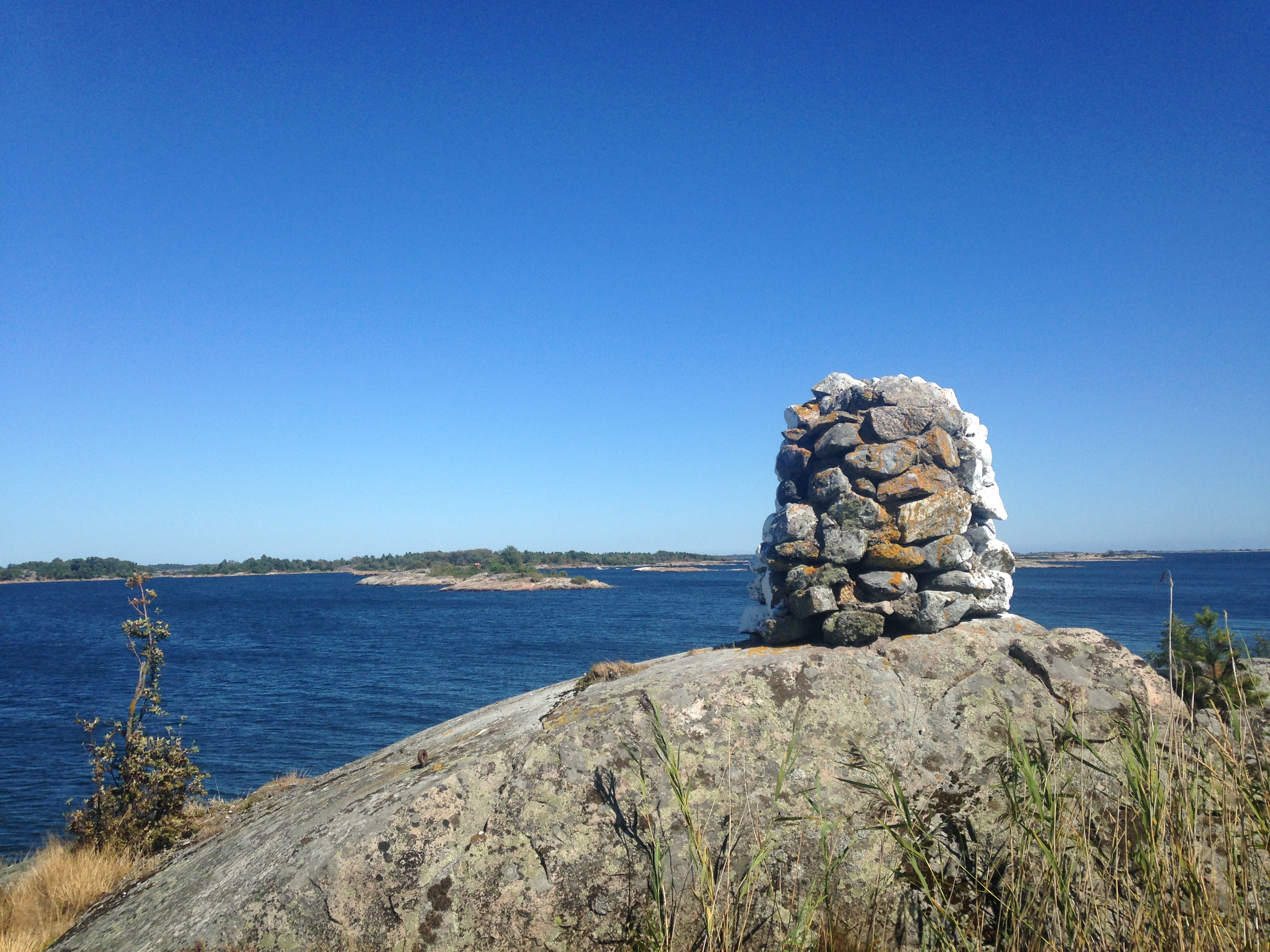 Stenkummel på Kummeludden, Ormskär, Stockholms län